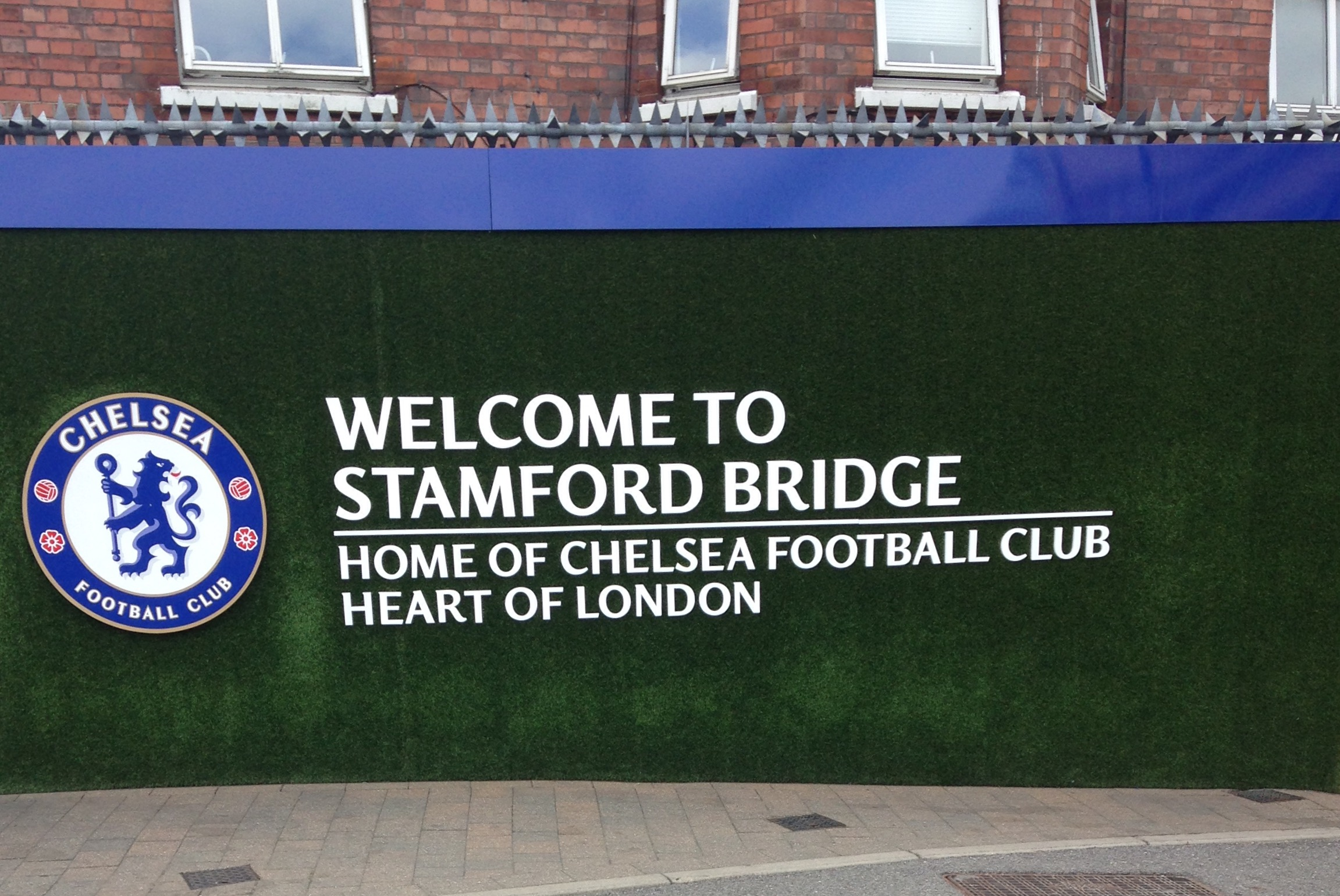 Message de bienvenue au stade de Stamford Bridge